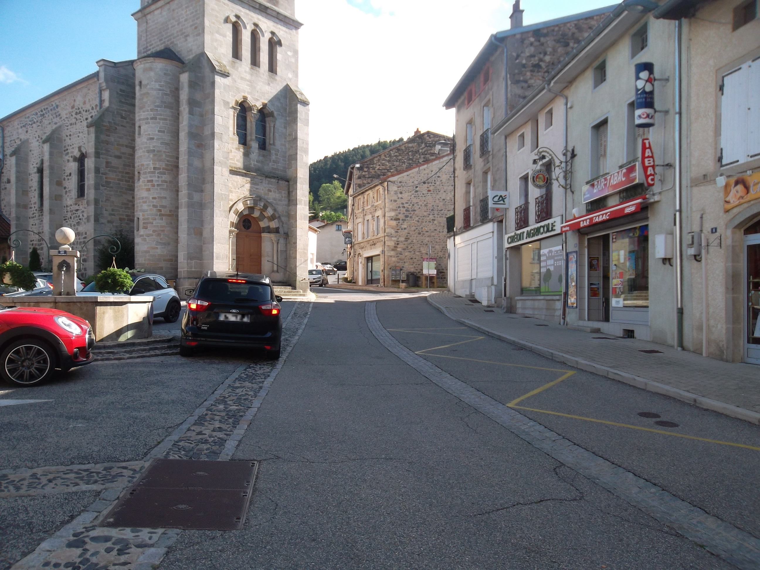 Lantriac Rue